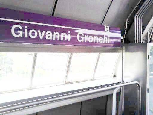 Placa da Estação Giovanni Gronchi da Linha 5 - Lilás